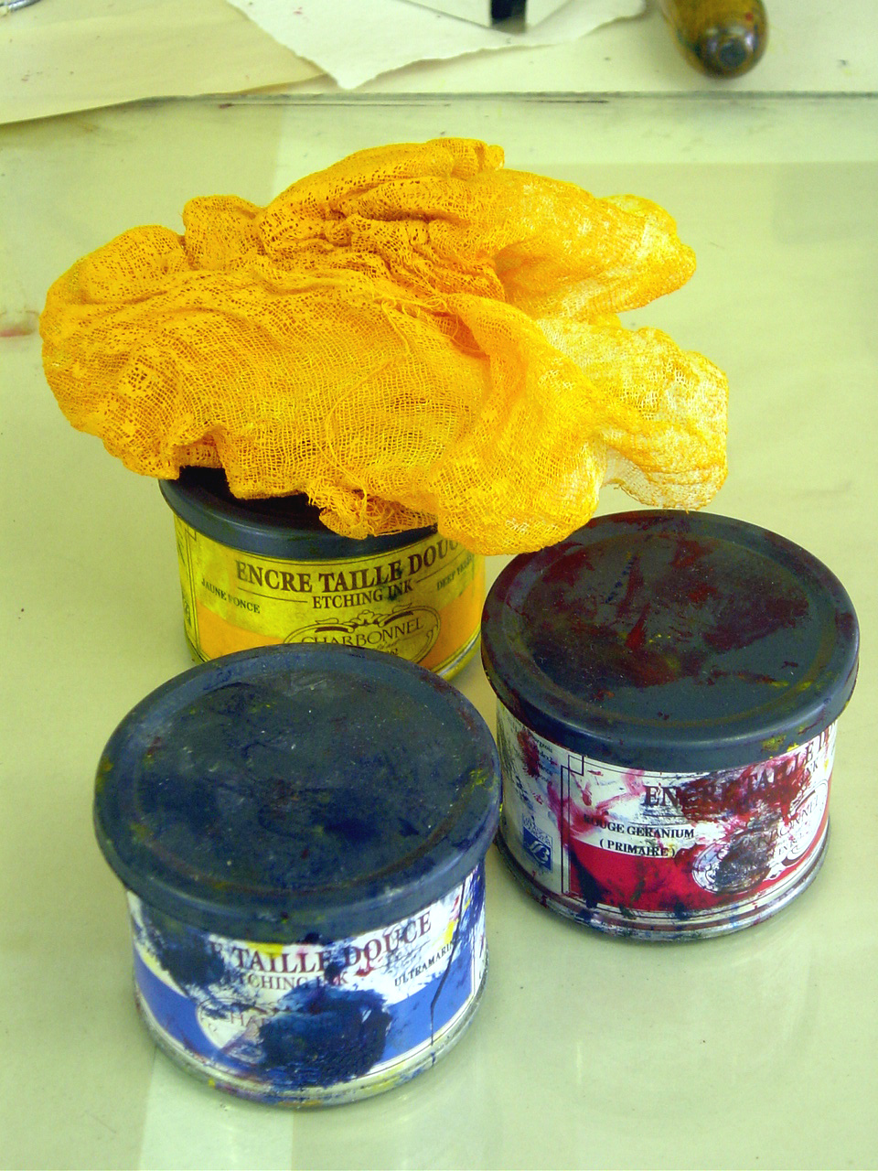 Intaglio printmaking — tarlatan and ink.